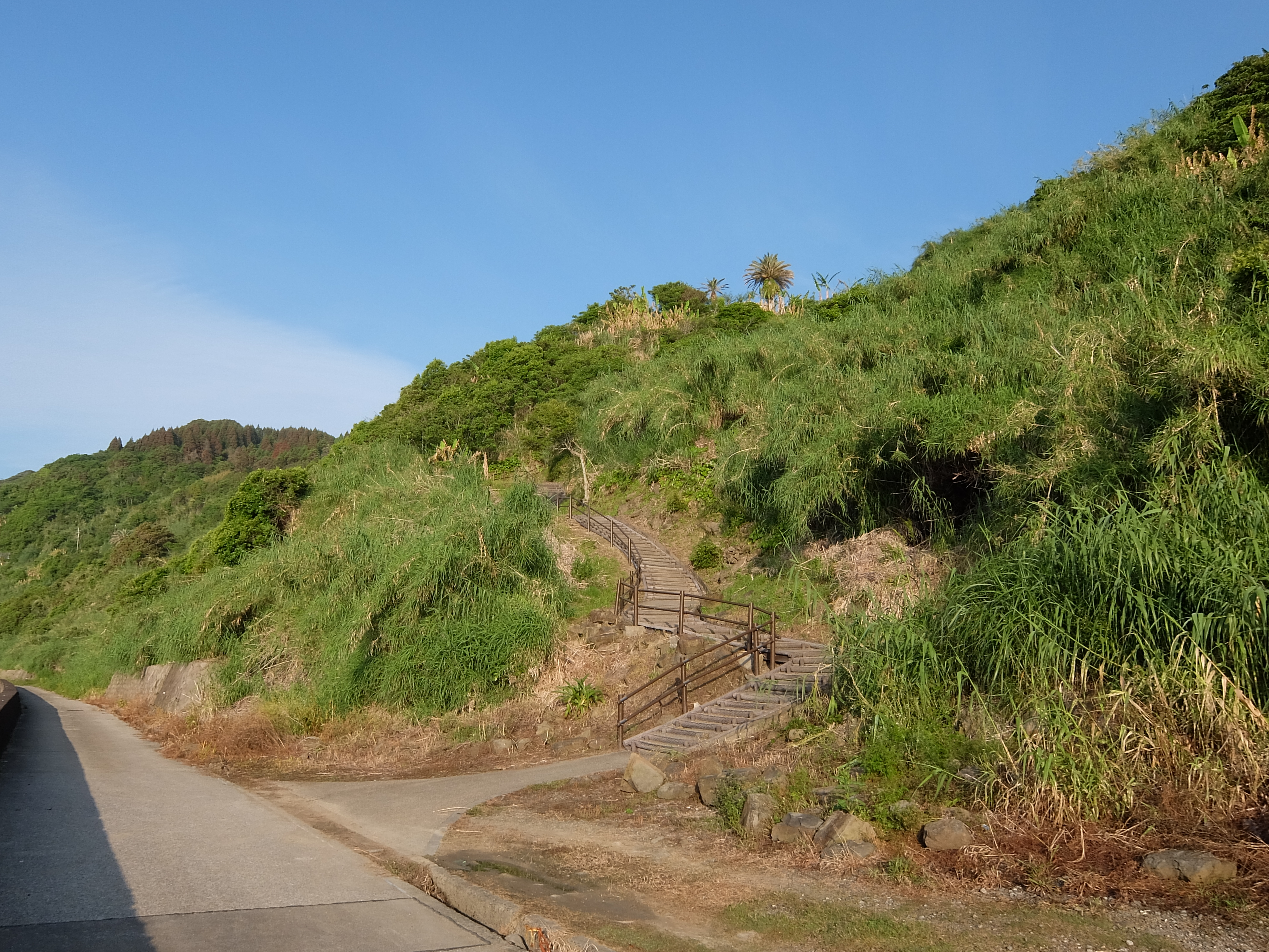 日南海岸 道の駅フェニックスのある県道より海岸まで下りることができる